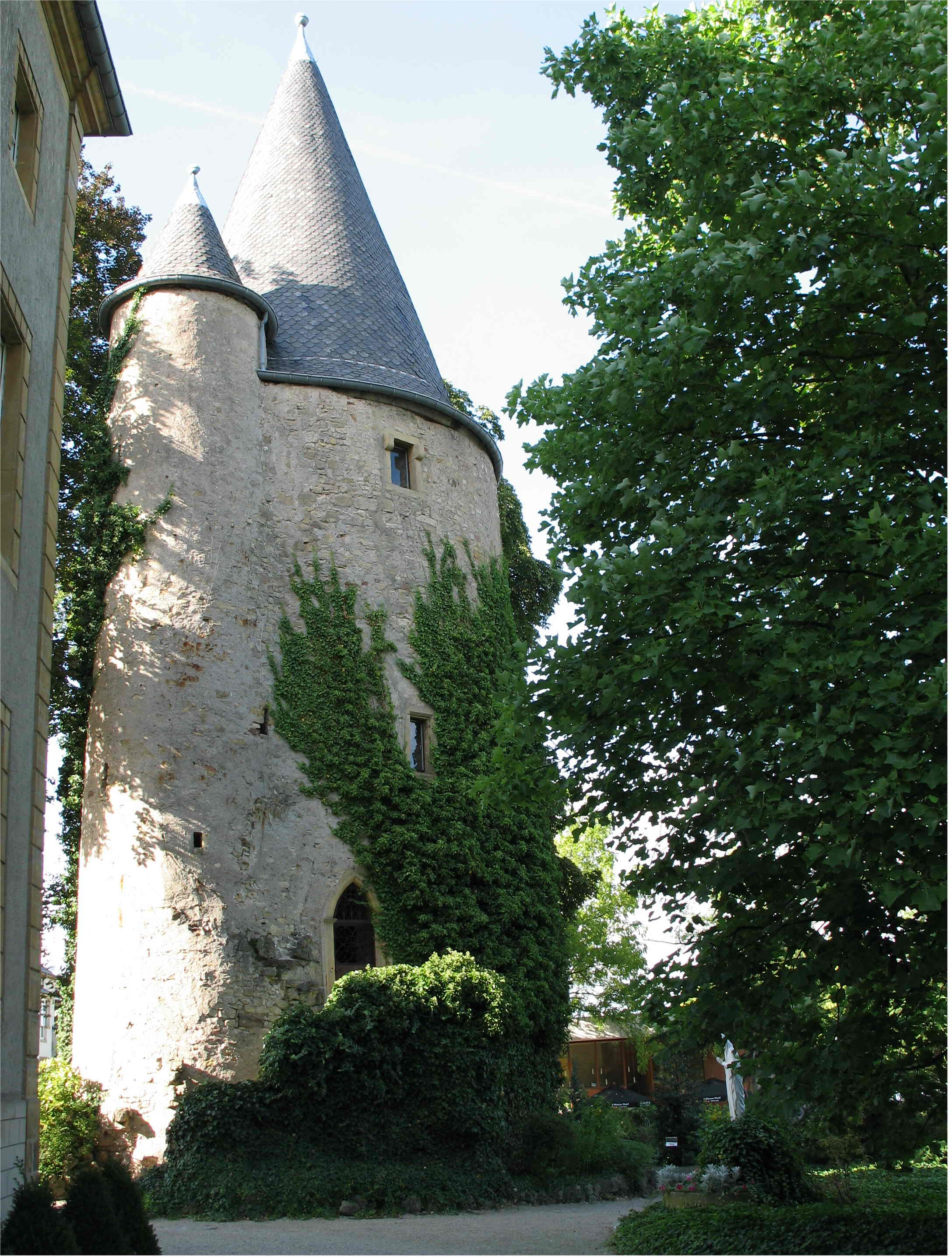 Tuerm beim Schengener Schlass